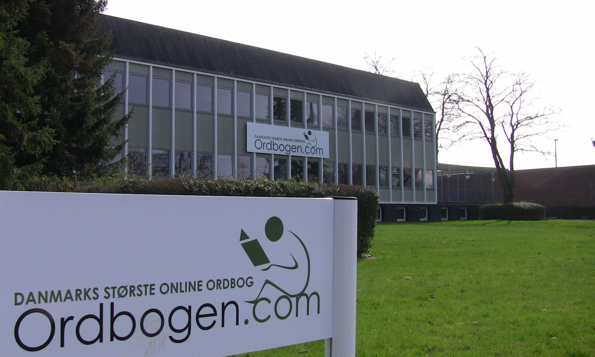 ' bygning i Odense